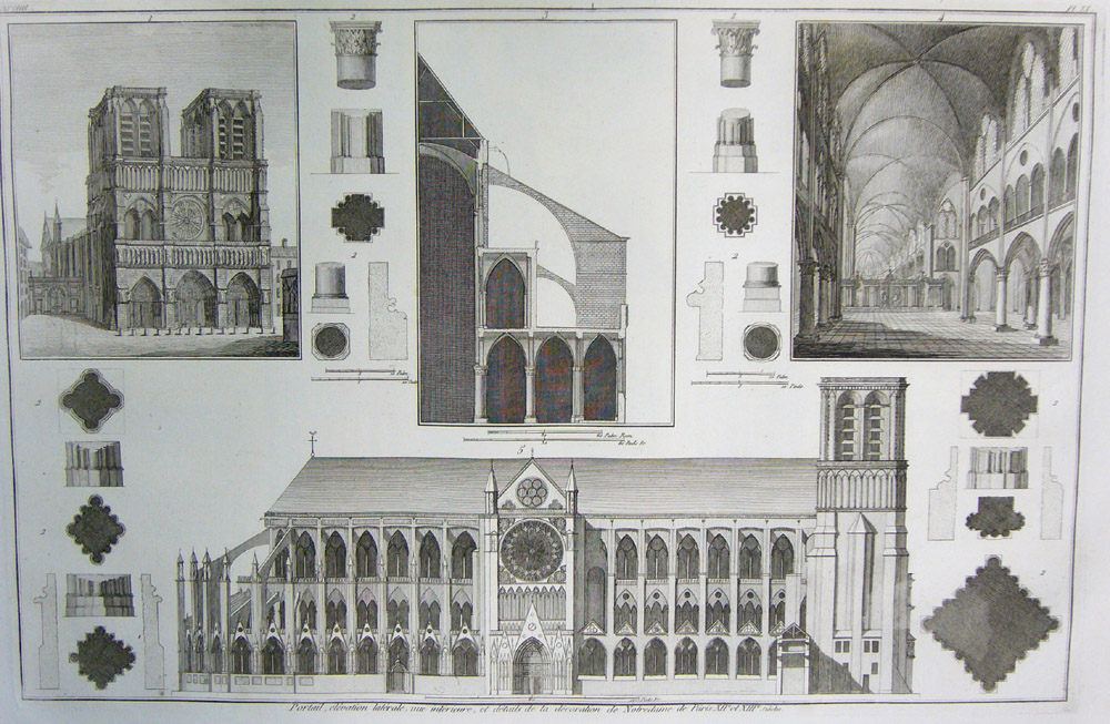 Seroux d'Agincourt, Architecture, Planche XL